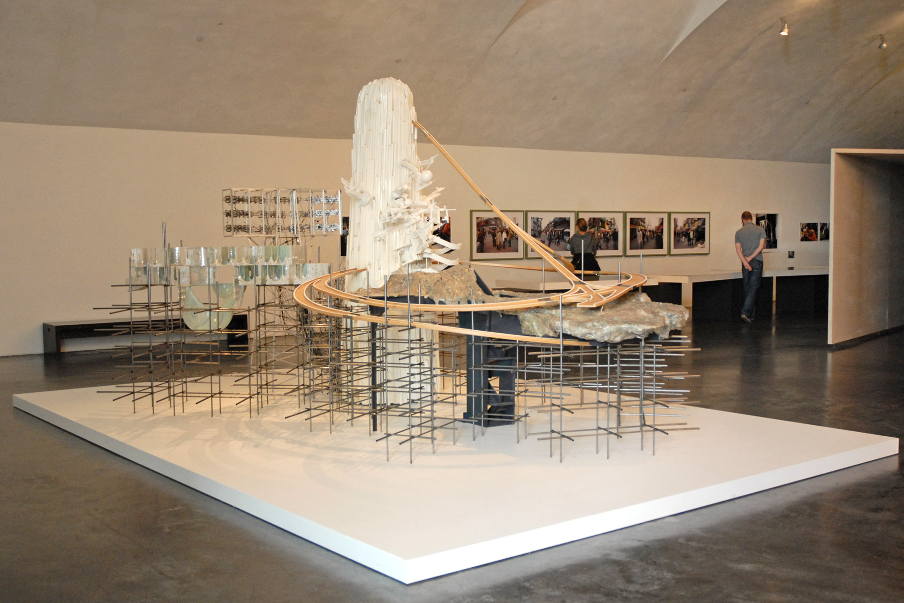 "Mon grand récit : Weep into stones", 2005 Oeuvre de Lee Bul (1964-), South Corea Courtesy of PKM Gallery, Seoul Le Kiasma est le grand musée d'art contemporain d'Helsinki. La bâtiment a été conçu par l'architecte américain : Steven Holl qui a réussi son intégration en plein coeur de la ville. L'établissement a été inauguré en mai 1998 et fête son 10 ème anniversaire par des expositions et manifestations exceptionnelles. Le Kiasma possède des collections permanentes mais se définit comme un carrefour de toutes les formes d'expression artistique. Chaque année en août, se déroule le festival URB concernant les cultures urbaines (skate, techno, rap, hip hop,..)